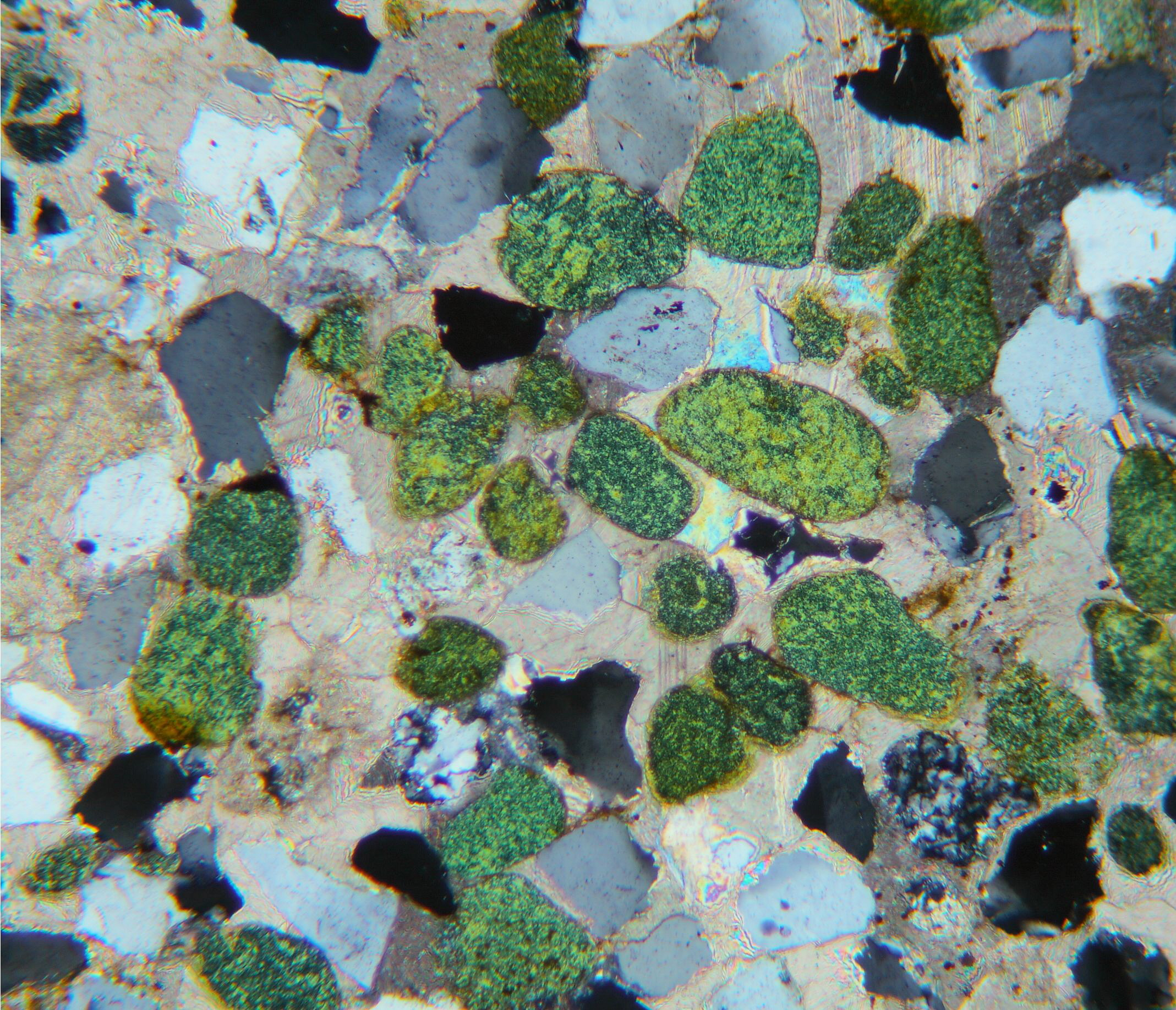 Glaukonit (Pellets) in einem mikritisch gebundenen Kalksandstein (Dünnschliff). Faltenmolasse, Byern.